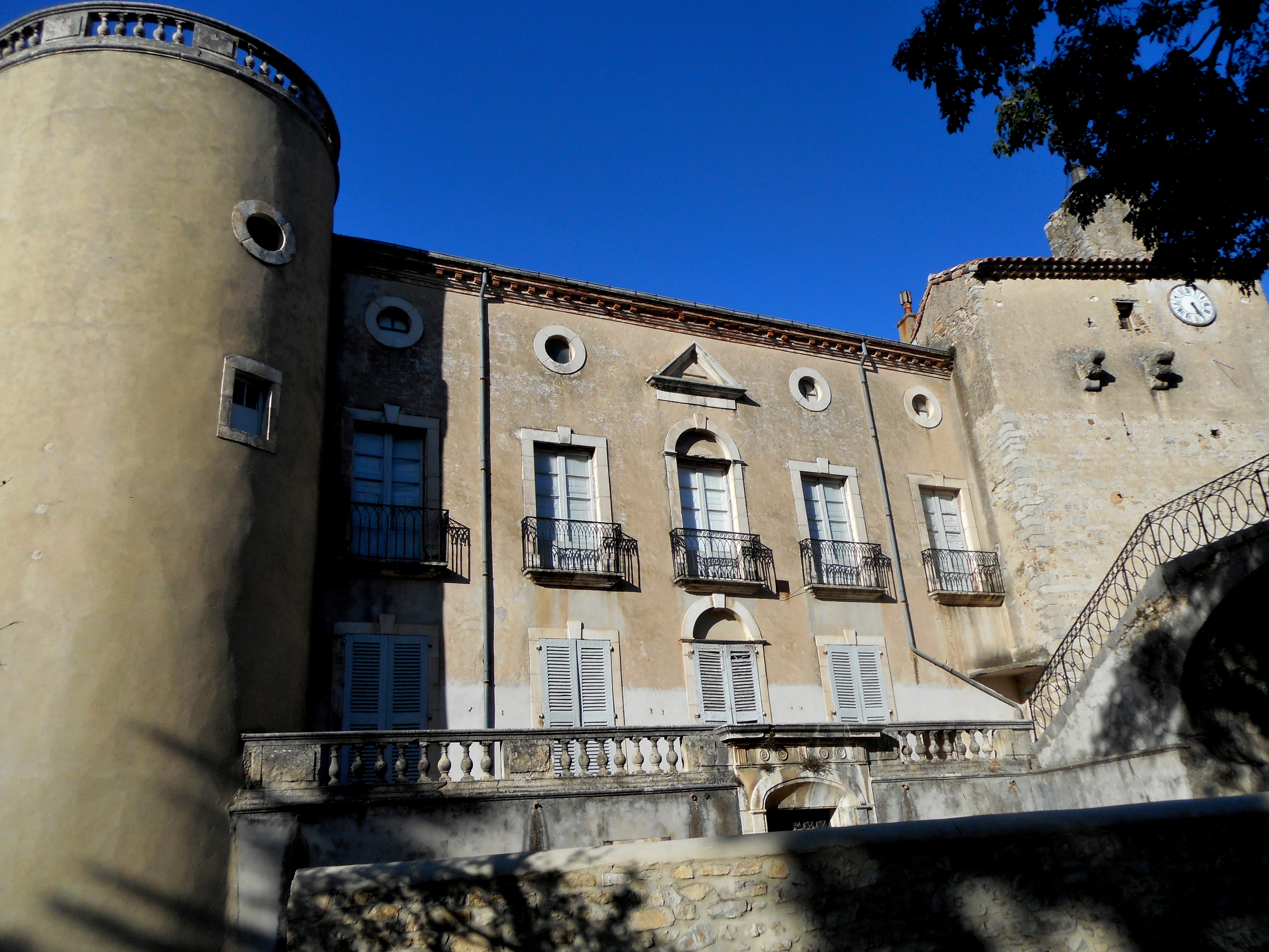 Château de LEZAN vu depuis son parc, sous un ciel bleu sans nuage pris en milieu d'après-midi. .